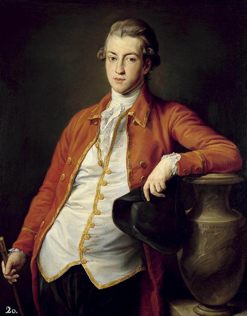 Retrato del aristócrata inglés Francis Basset (1757-1835), que llegaría a ser el primer barón de Dunstanville y Basset.